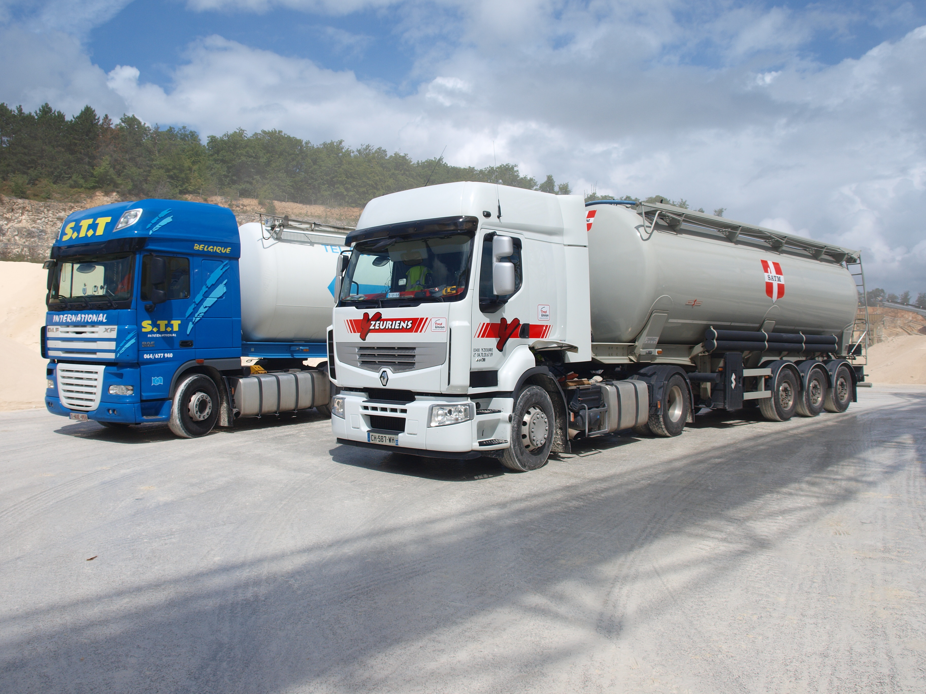 Camion citerne pour le transport des matières pulvérulentes.